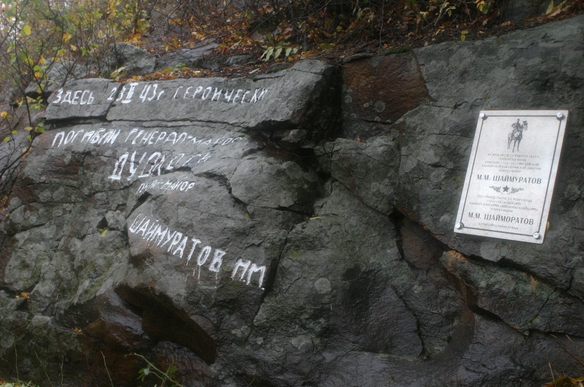 Памятная доска на месте гибели Шаймуратова Минигали Мингазовича. Украина, с.Штеровка. Из архива РОО ВИК "1-й башкирский конный полк - "Любизар" Республики Башкортостан